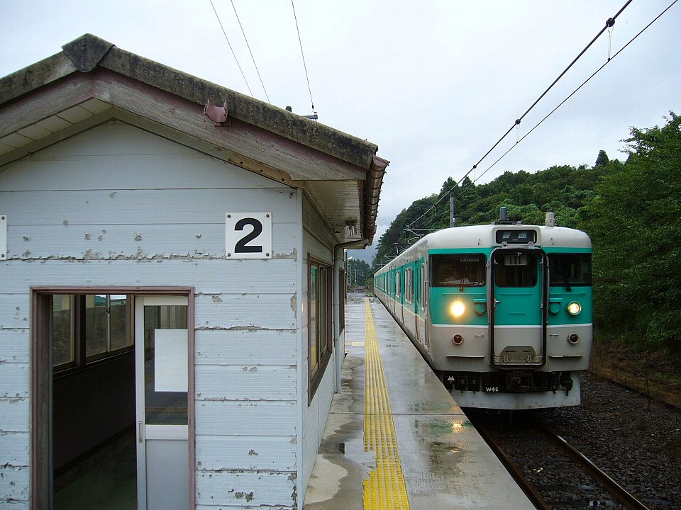 粟野駅へ進入する113系電車